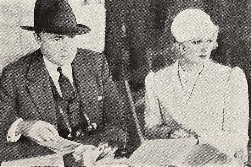 Gene Markey e Joan Bennett